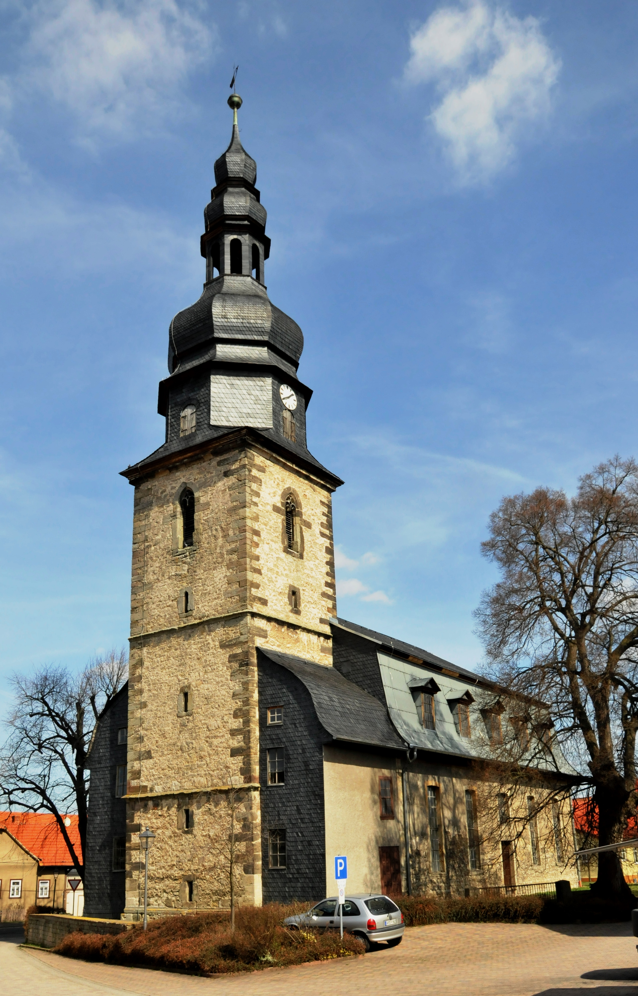 Kirche in Wüllersleben